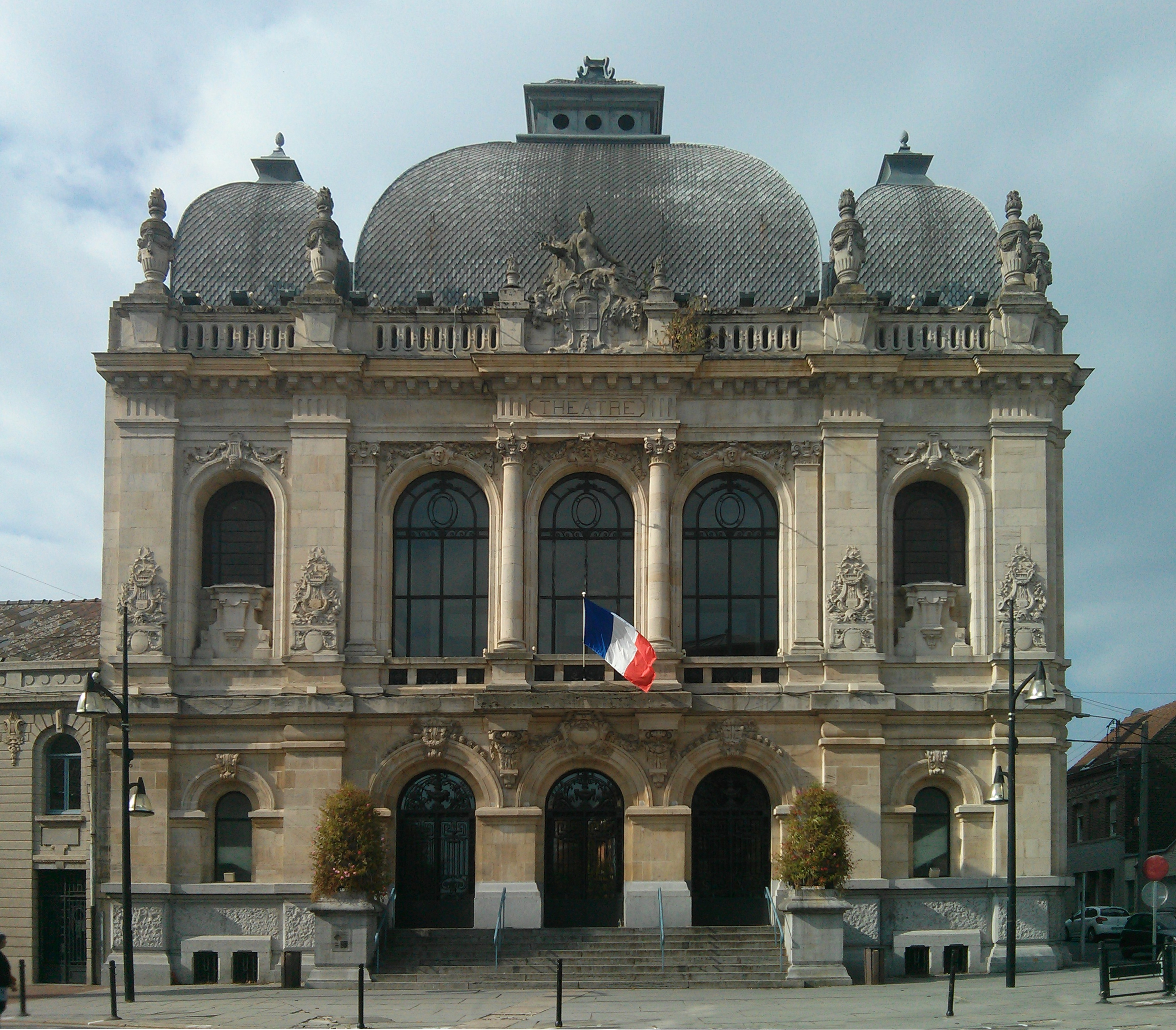 Photographie du théâtre municipal de Denain, classé aux monuments historiques